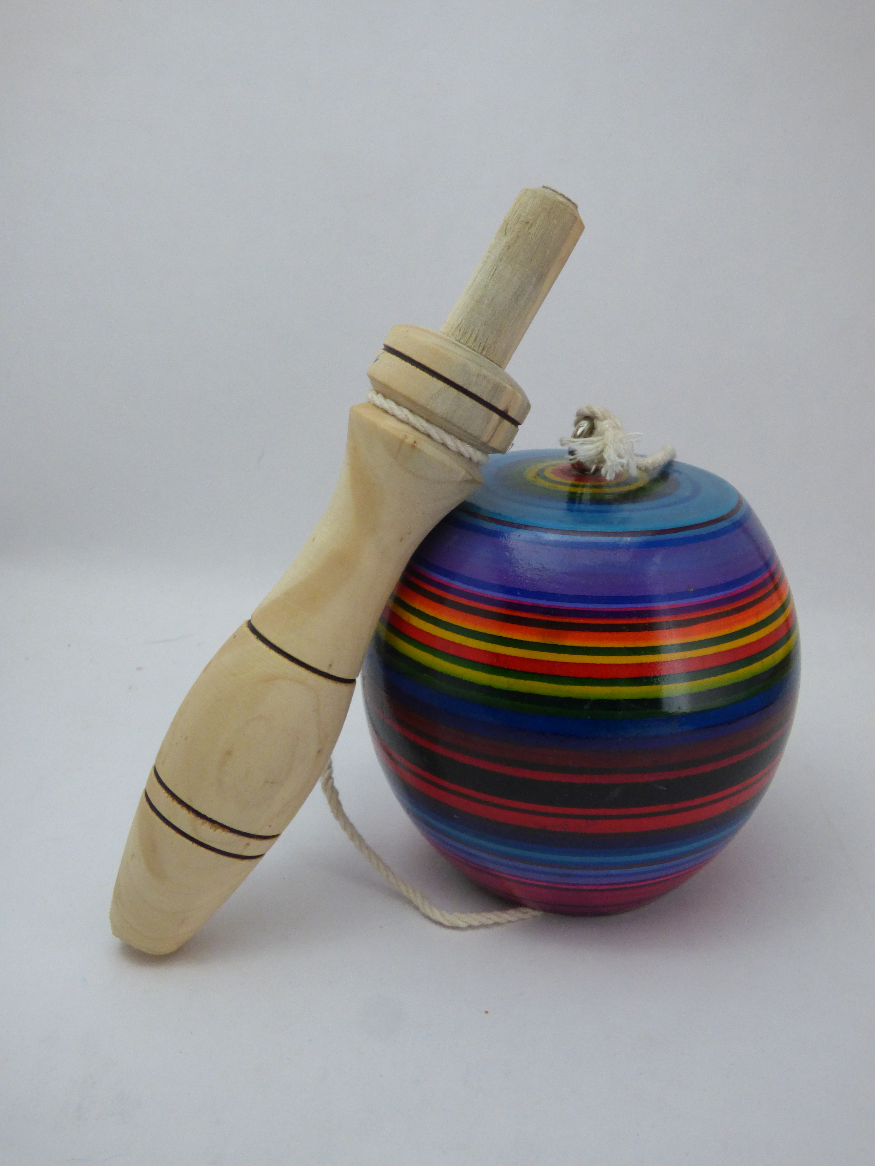 Juguetes del taller de Zenón Hernández en Teocaltiche, Jalisco